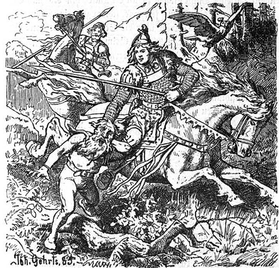 "Dietrich fängt den Zwerg Alfrich" (1883) by Johannes Gehrts.